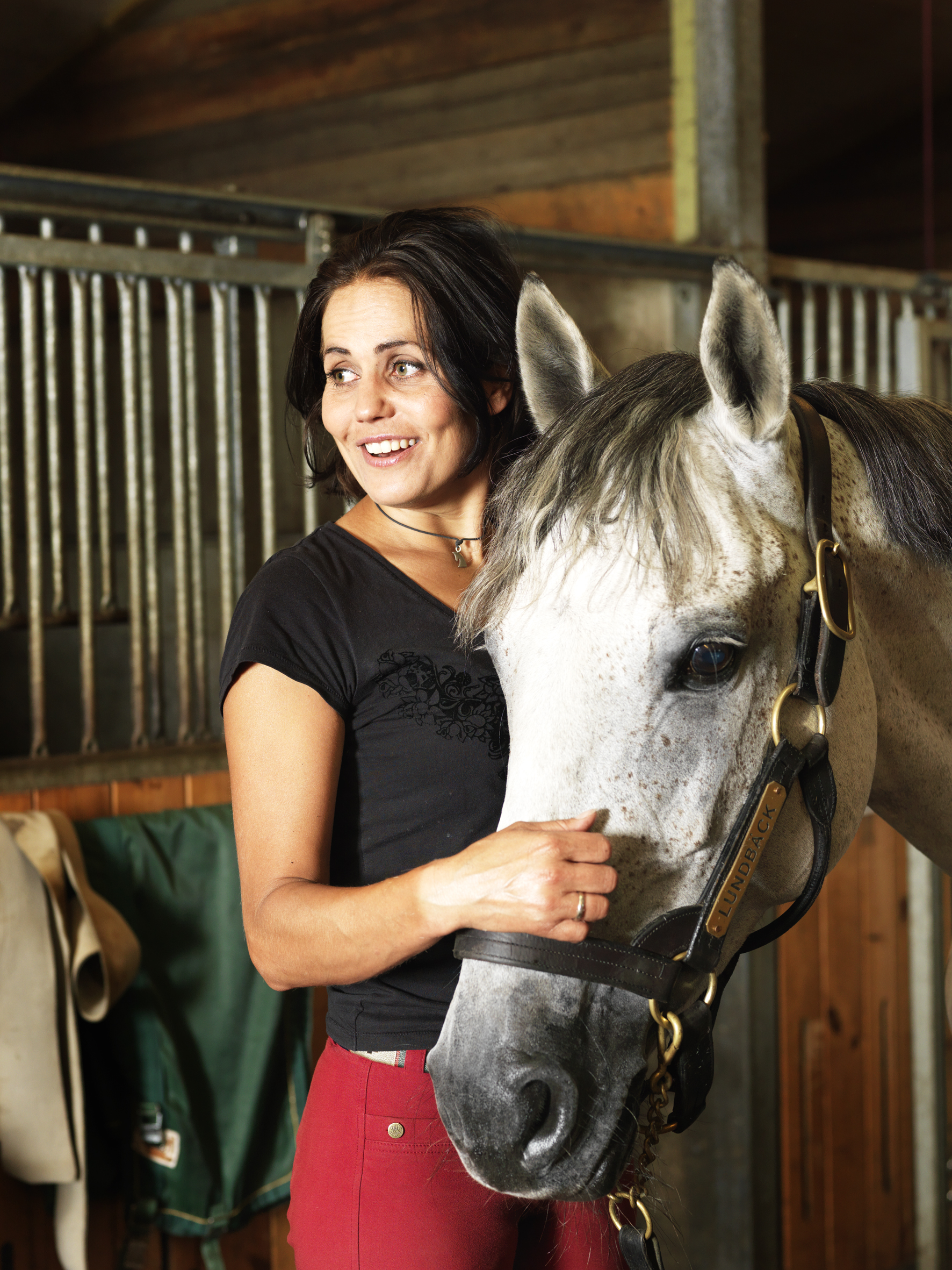 Den svenska hoppryttaren Helena Lundbäck.